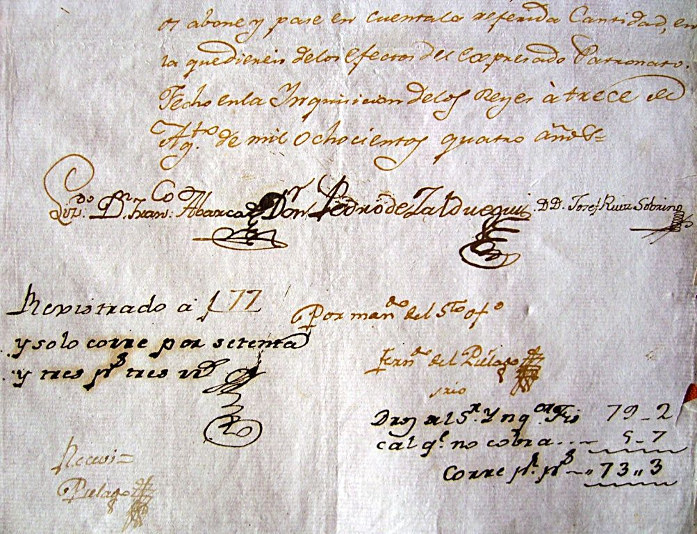 Firma de Francisco Abarca Calderón, Pedro de Zalduegui y José Ruíz Sobrino